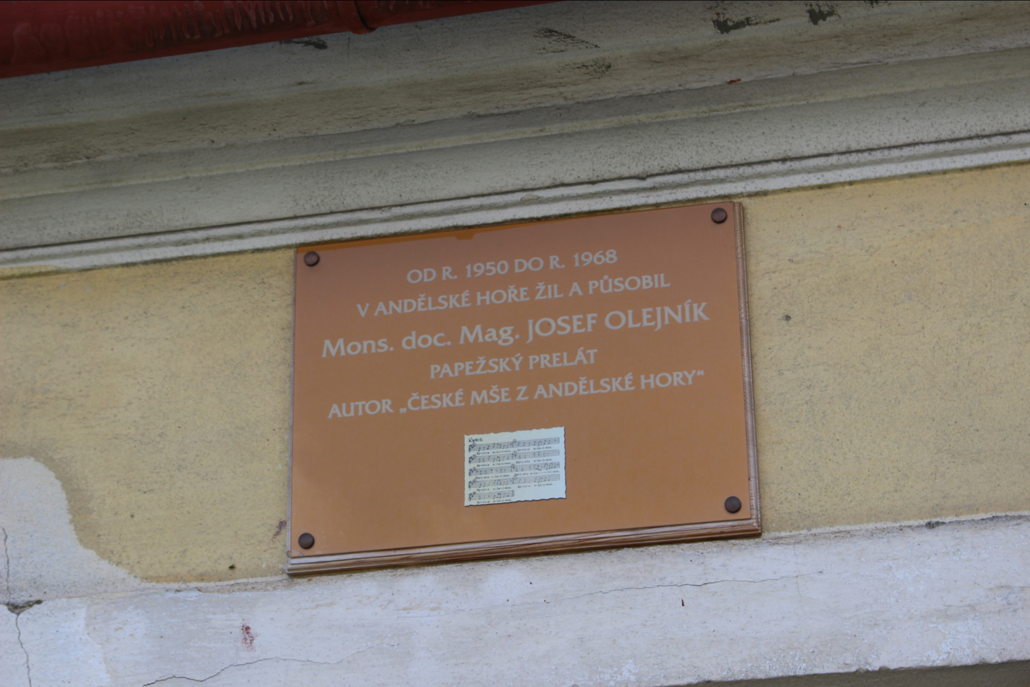 pamětní deska Mons. Josef Olejník na kostele Narození Panny Marie, Andělská Hora, okres Bruntál, Moravskoslezský kraj